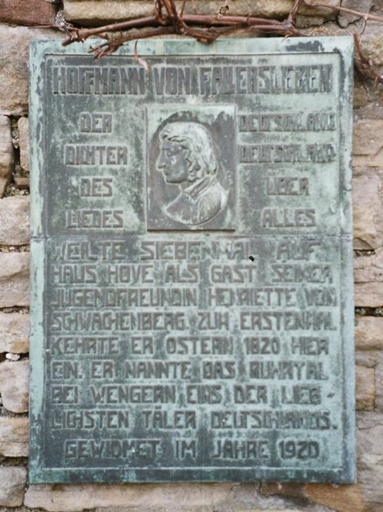 Gedenktafel für August Heinrich Hoffmann von Fallersleben an Haus Hove in Wengern